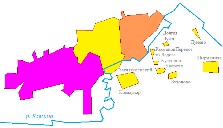 Районы Владимира